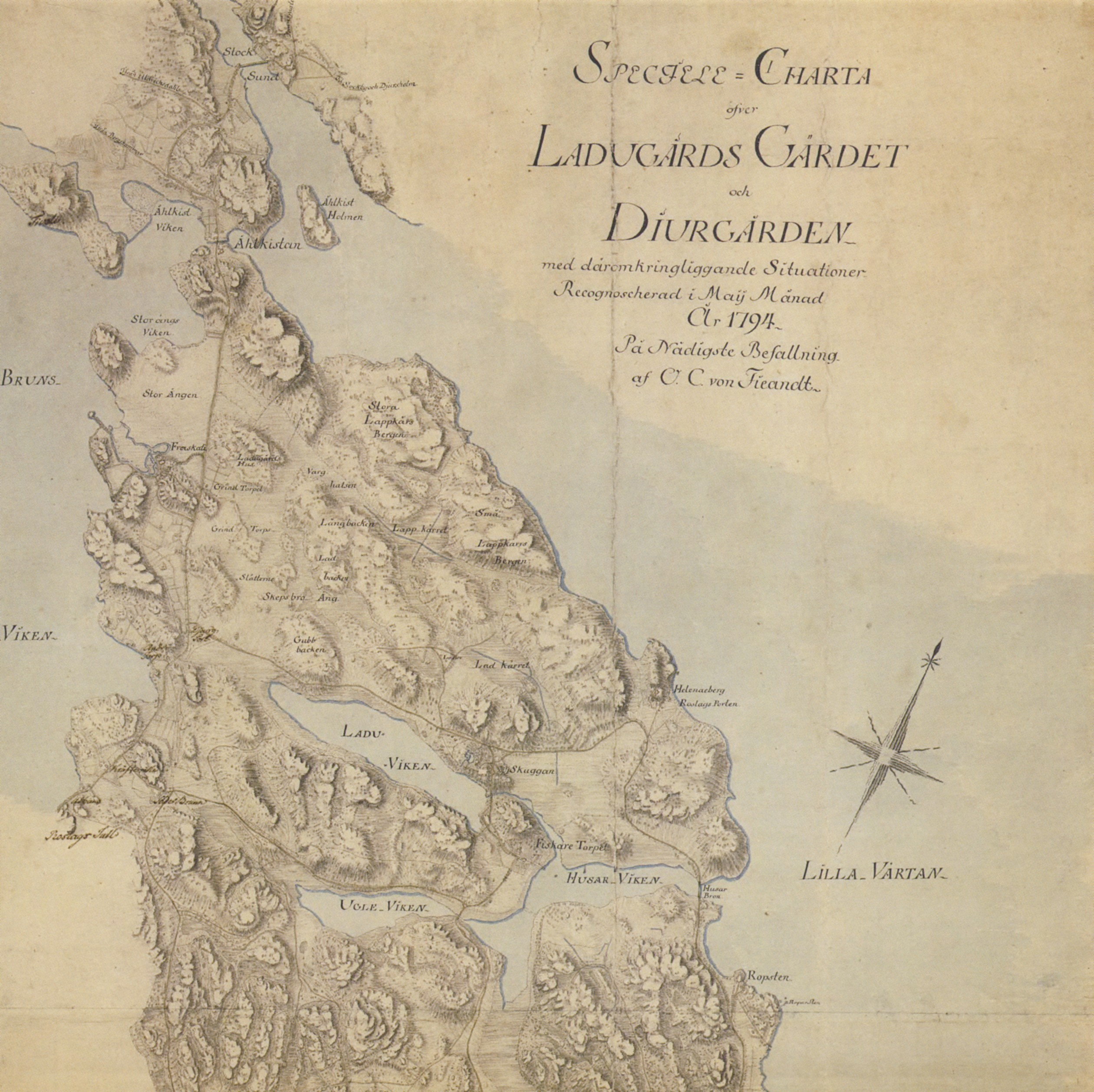 "Ladugårds Gärdet och Djurgården med däromkringliggande Situationer" (norra del)